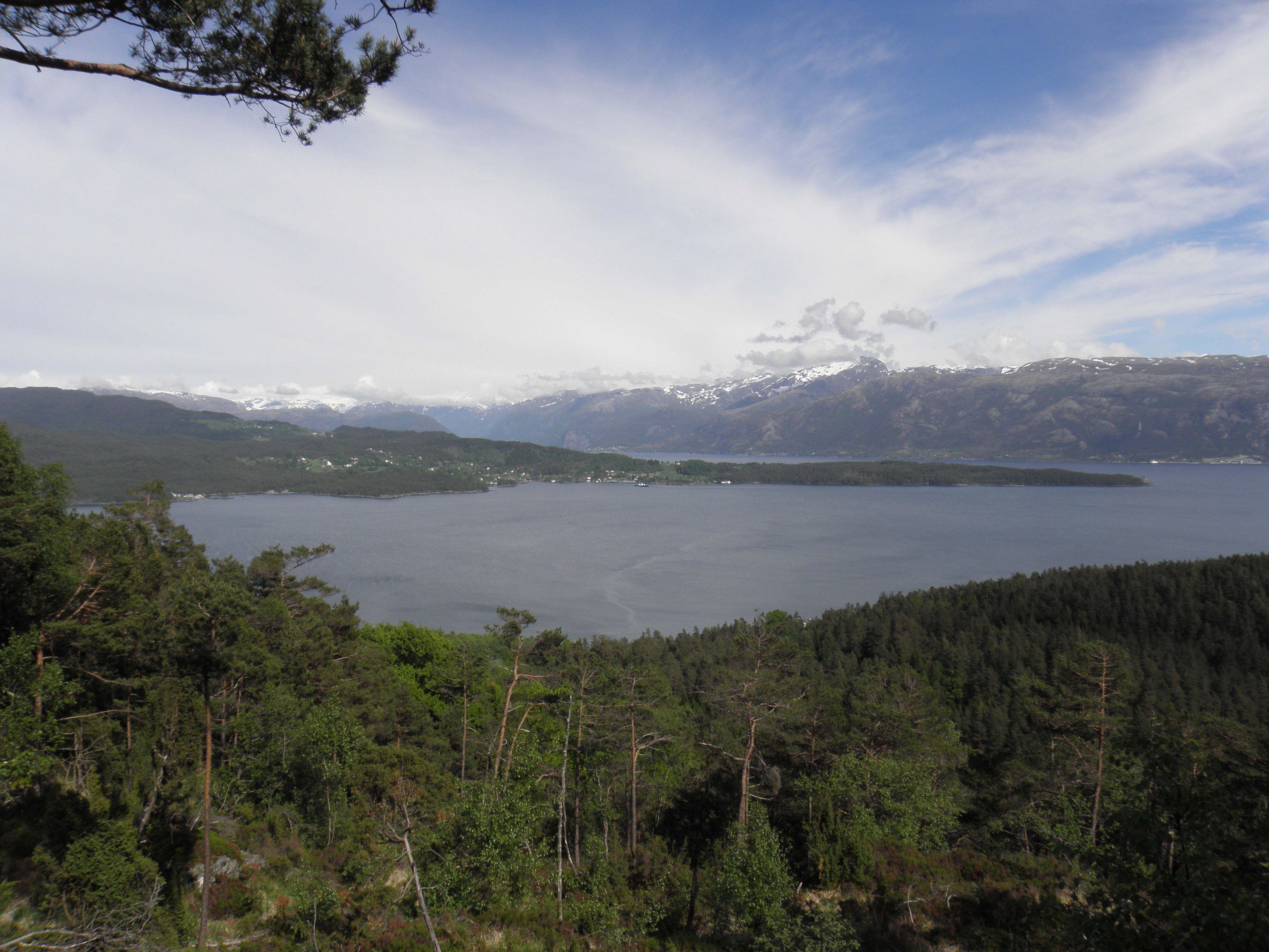 Øynefjorden fotografert frå nær Sjondarhaug i Kvinnherad.